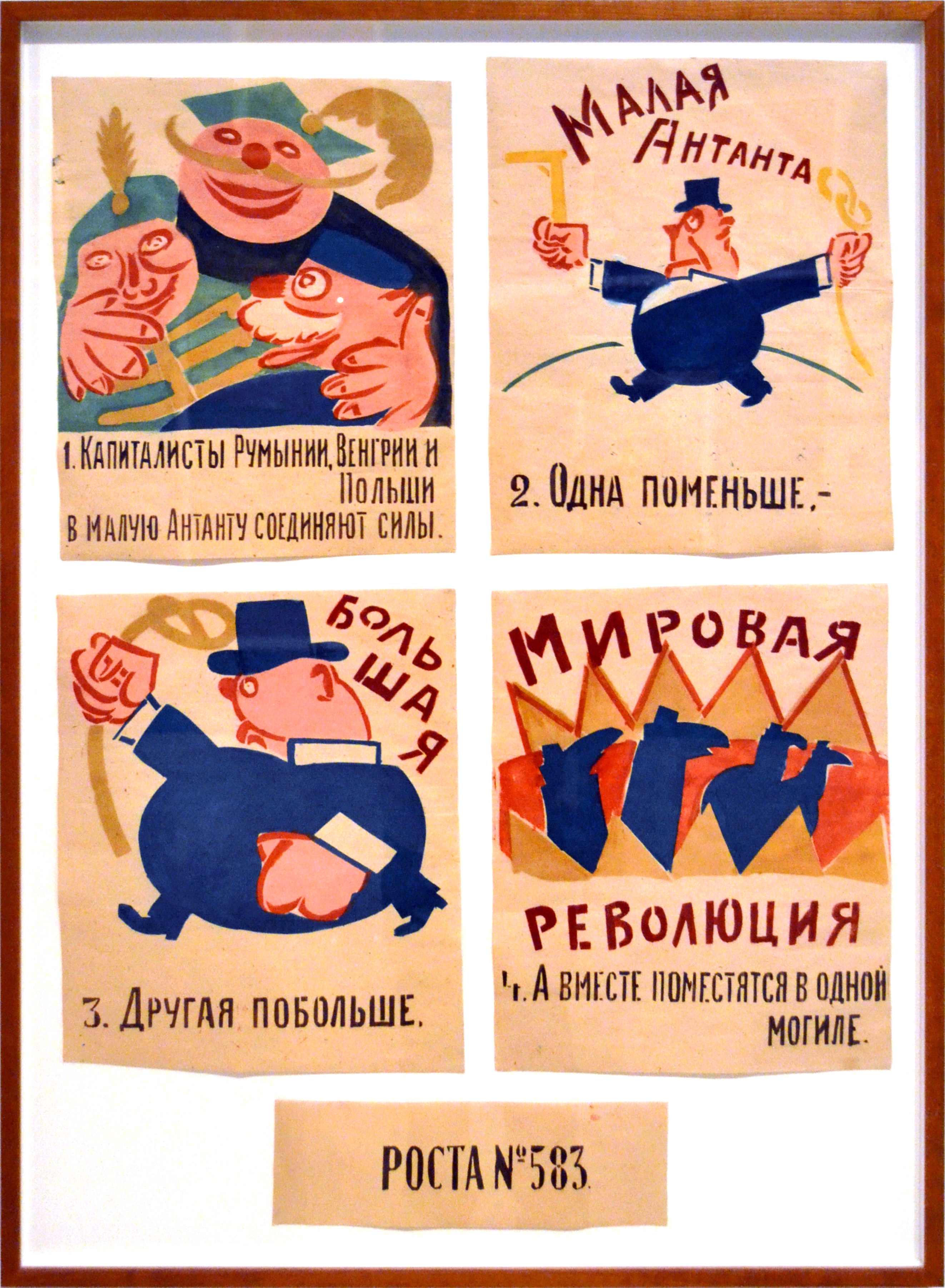 Vladímir Maiakovski, Rosta, num. 583, novembre de 1920. Estergit a quatre colors relalittzats a mà, 44,2 x 36,1 cm. Hi diu: 1. Els capitalistes de Romania, Hongria i Polònia han format el Petit Acord. 2. Un és més petit. 3. L'altre és més gran. 4. Però junts seran enterrats en una mateixa tomba. Institut Valencià d'Art Modern.